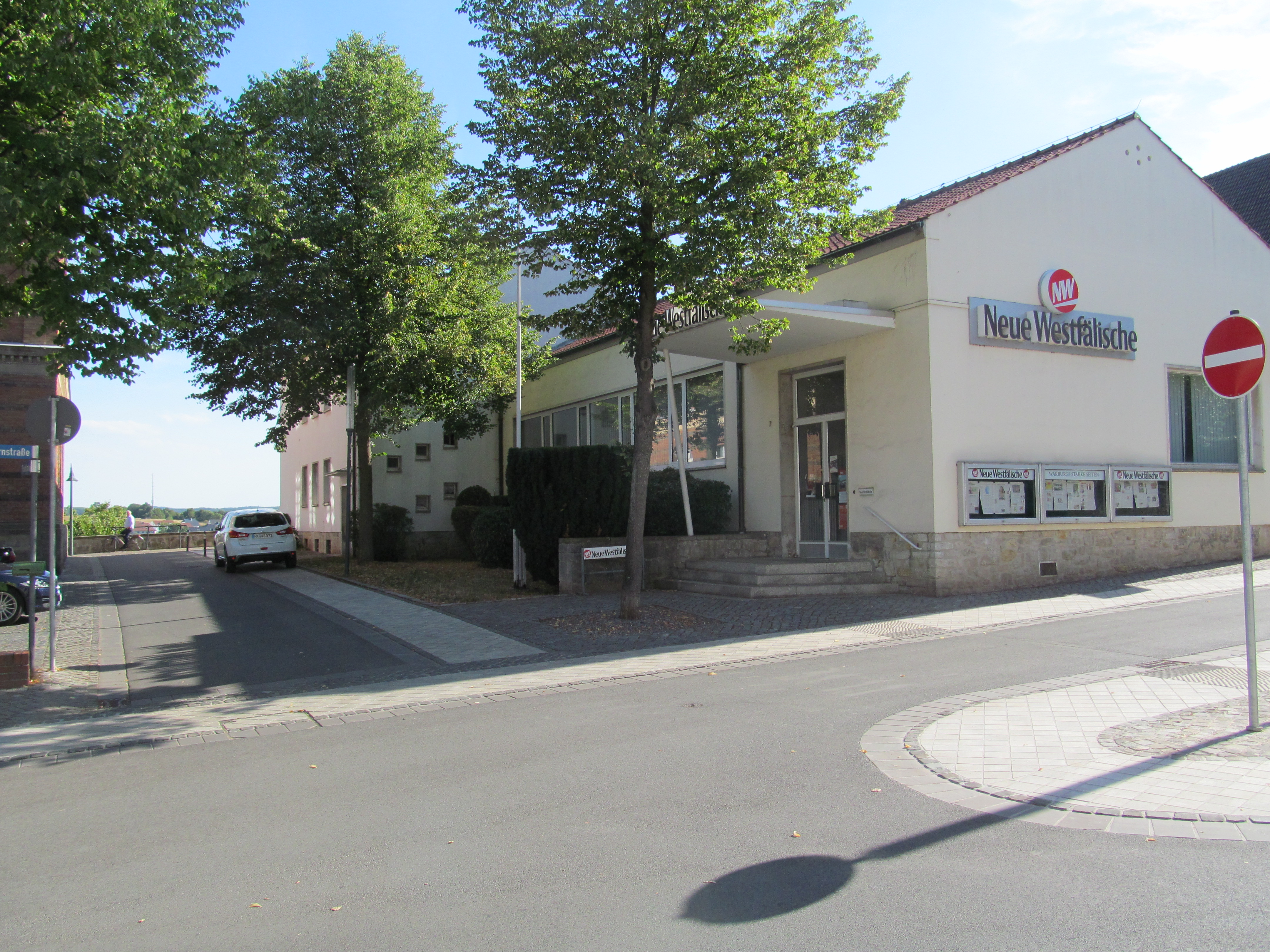 das Haus Puhlplatz 7 in Warburg, eine Filiale der Neue Westfälische